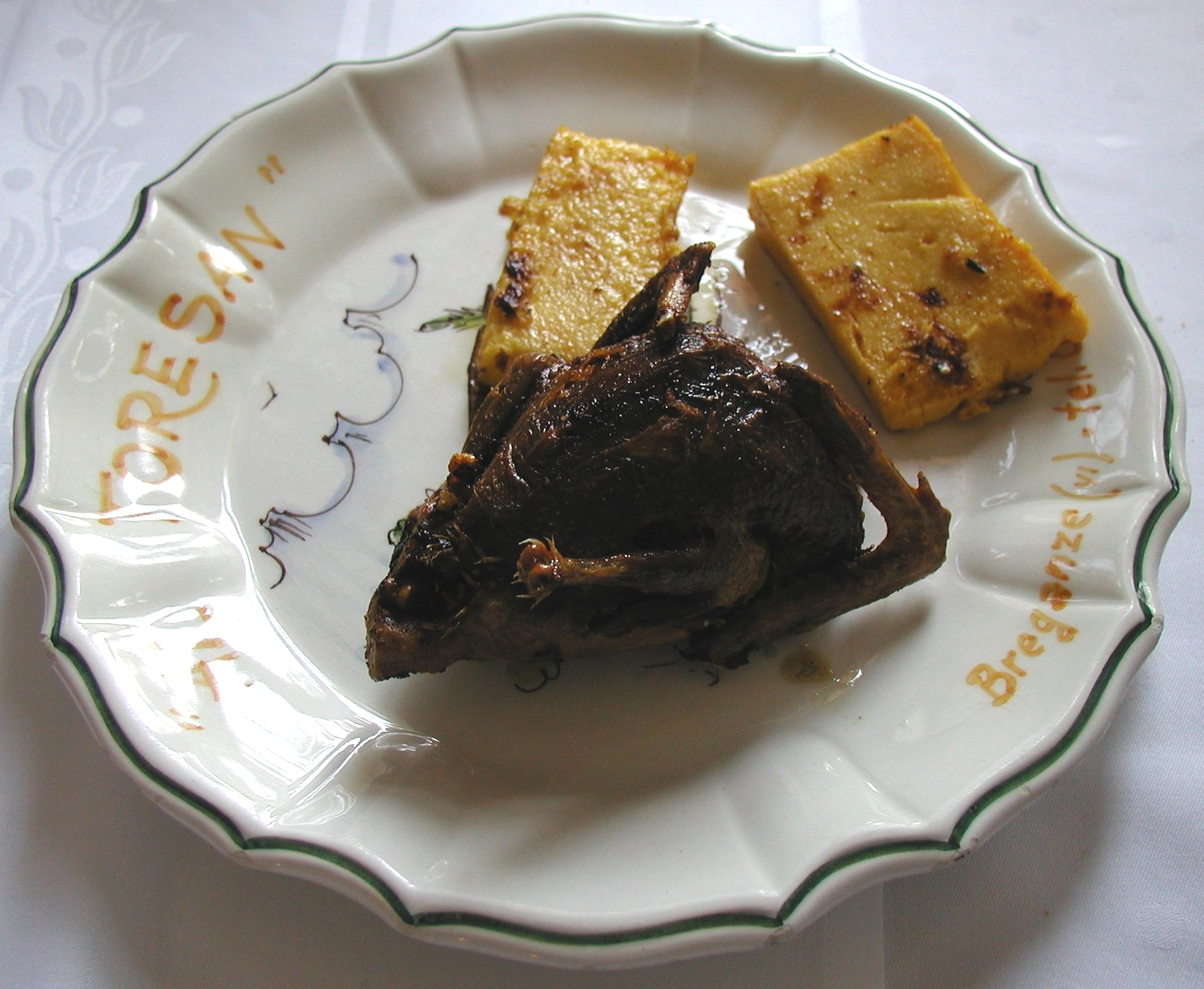 Toresan (piccione allo spiedo)